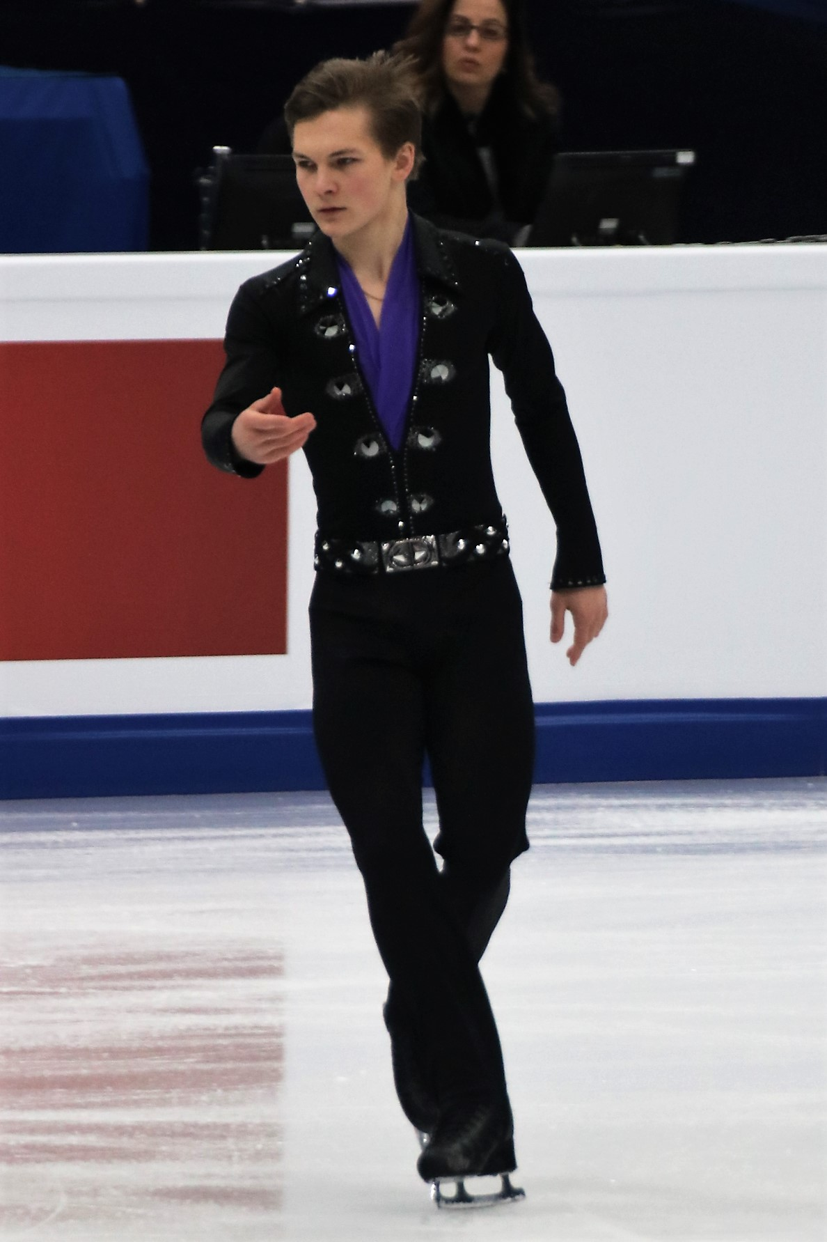 Михаил Коляда (Россия) на Чемпионате Европы по фигурному катанию 2018.